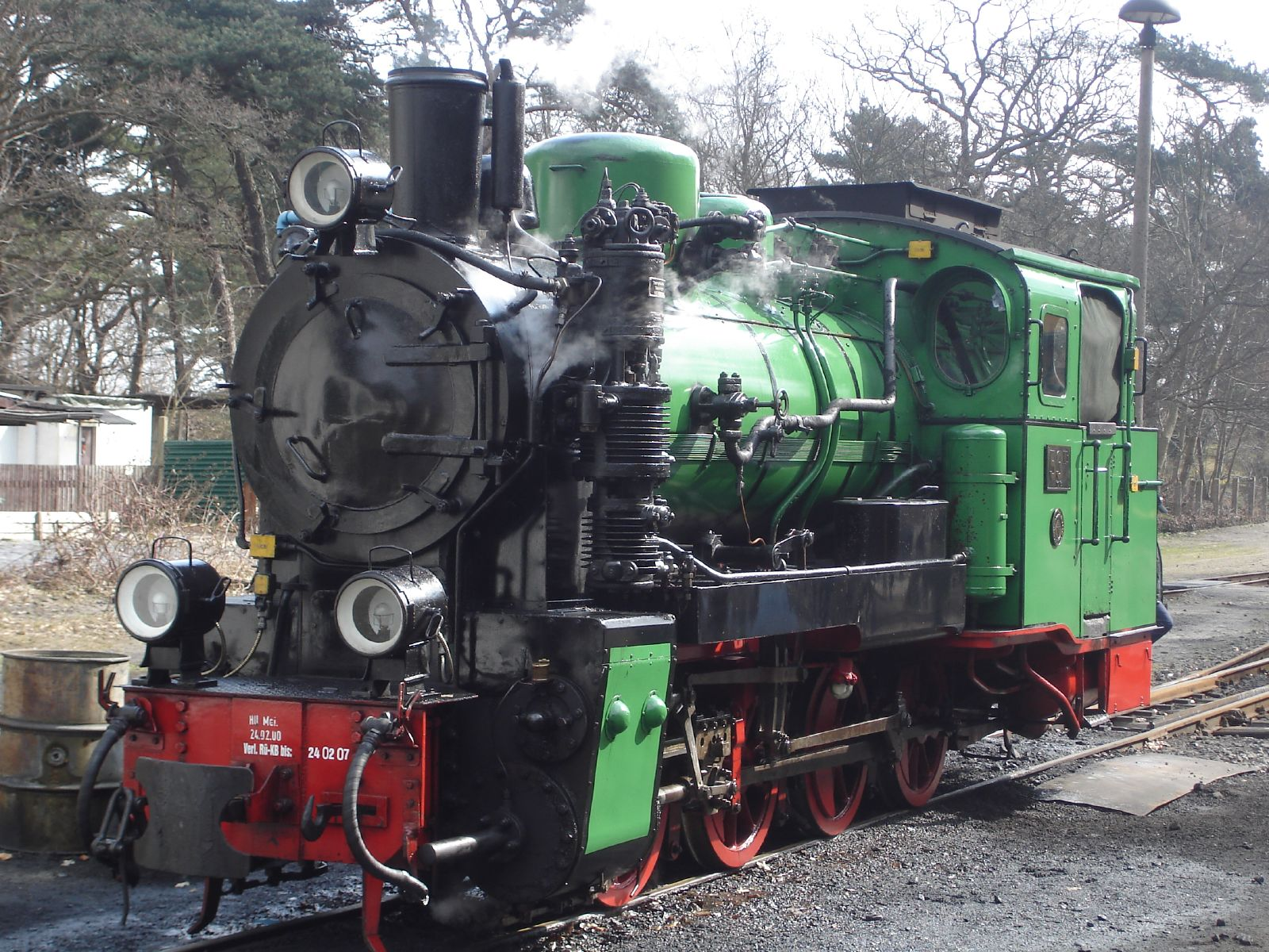 Rasender Roland 53 Rügensche Kleinbahn